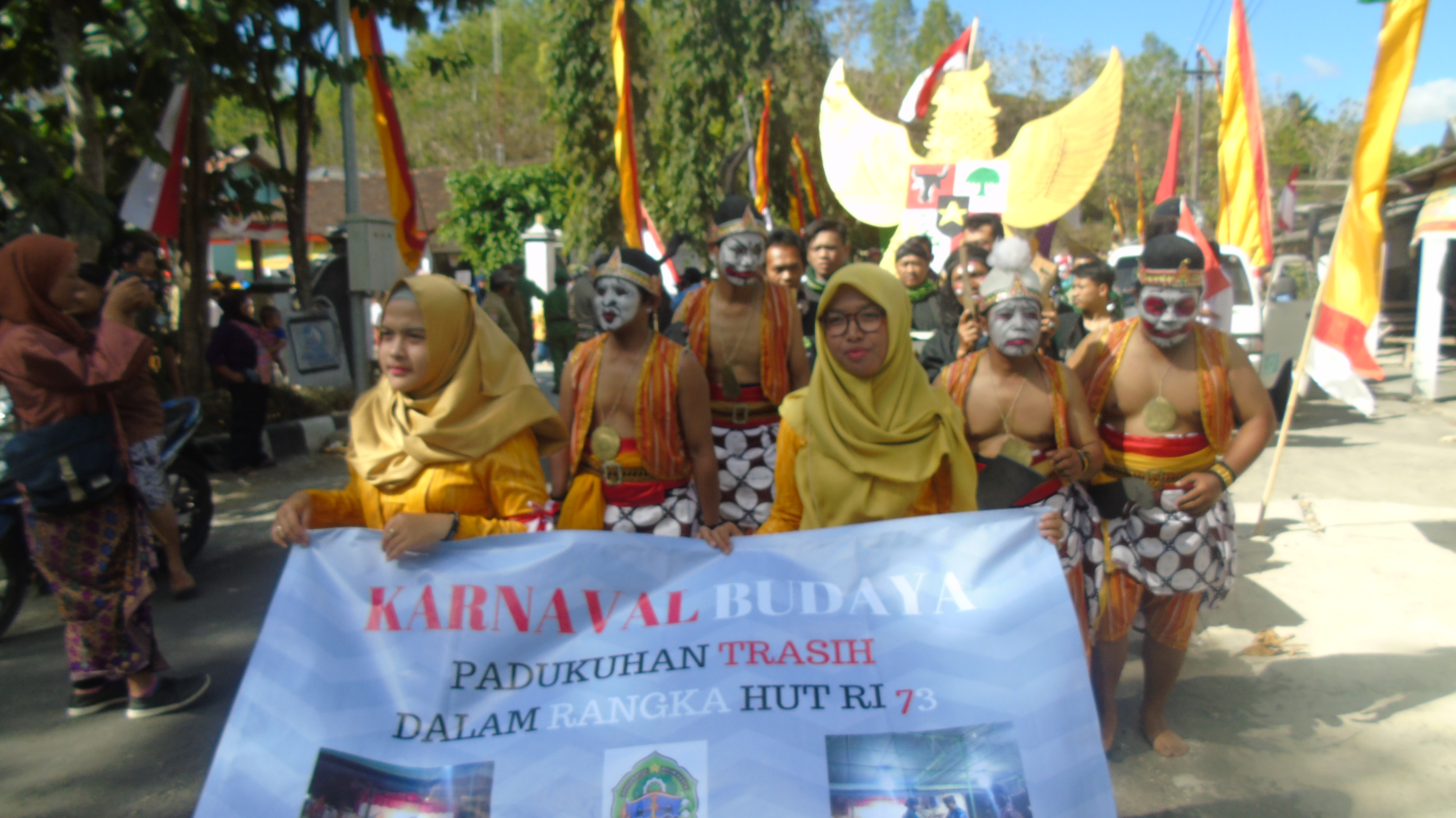 Peserta Kirab Budaya dalam Rangka HUT RI ke 73 di Desa Giriasih